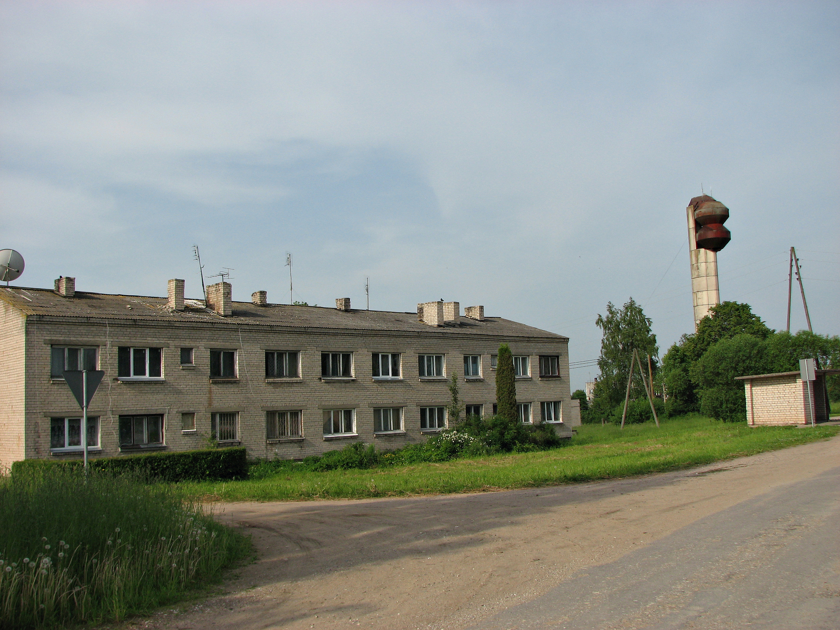 дом в Бикерниеки